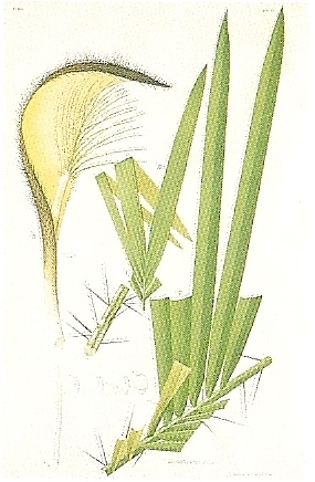 Bactris anisitsii (litografia s/ papel; 60 x 39 cm)